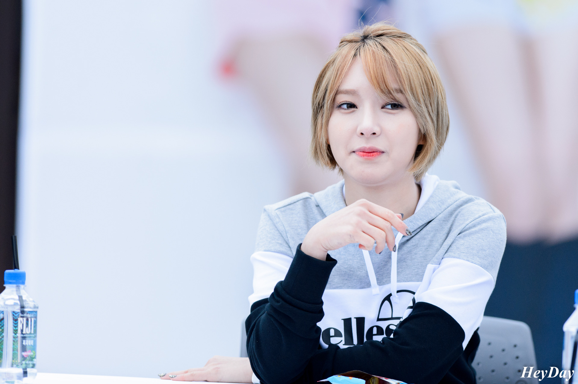 Choa von AOA bei der Autogrammstunde der Sportmarke Ellesse am 8. April 2016 in Seoul.